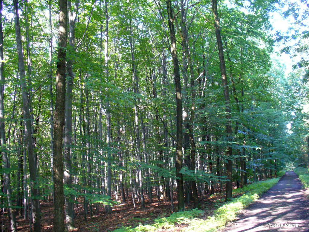 Uroczysko Buczyna